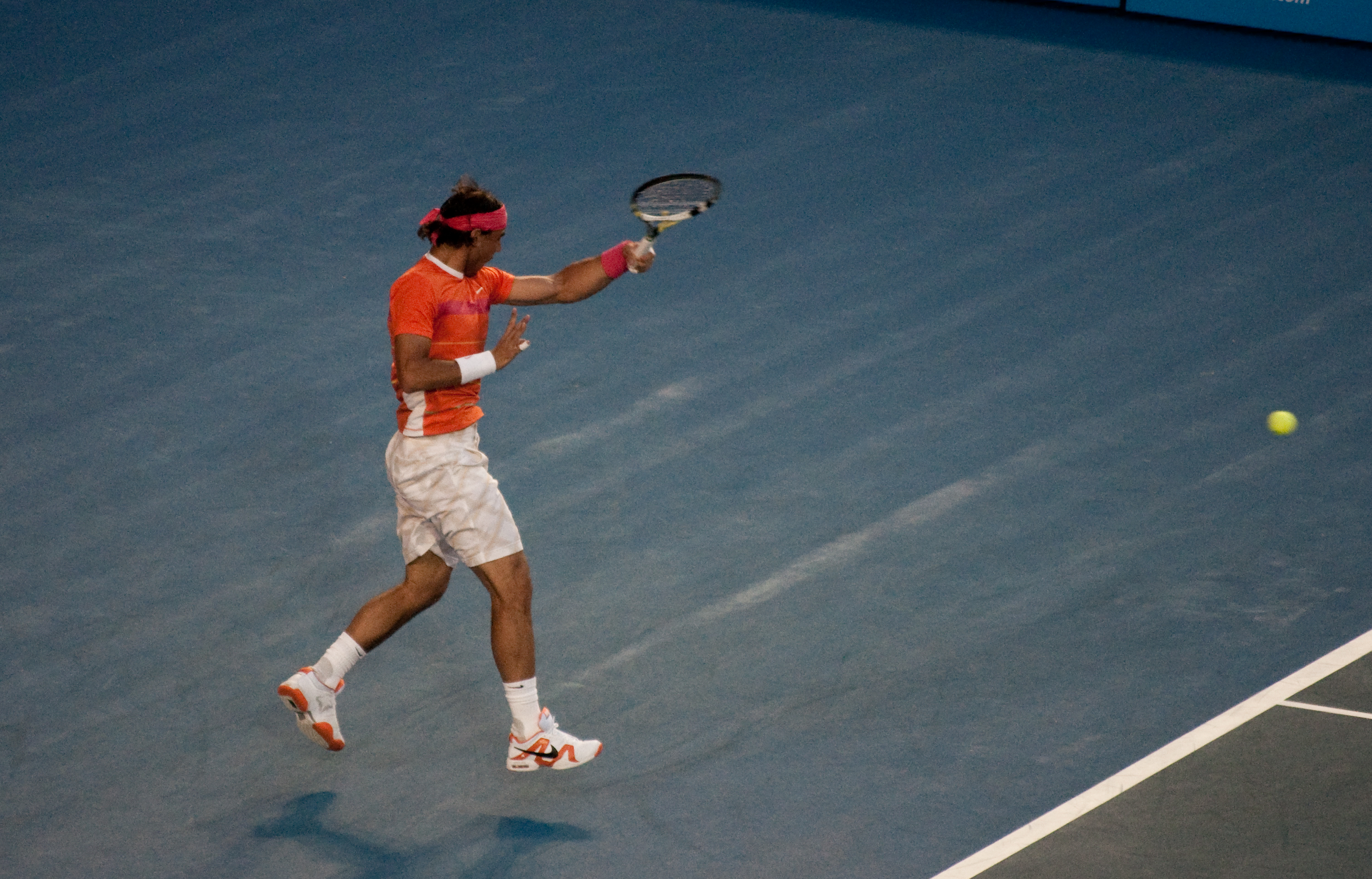 Australian Open 2010 Quarterfinals Nadal Vs Murray